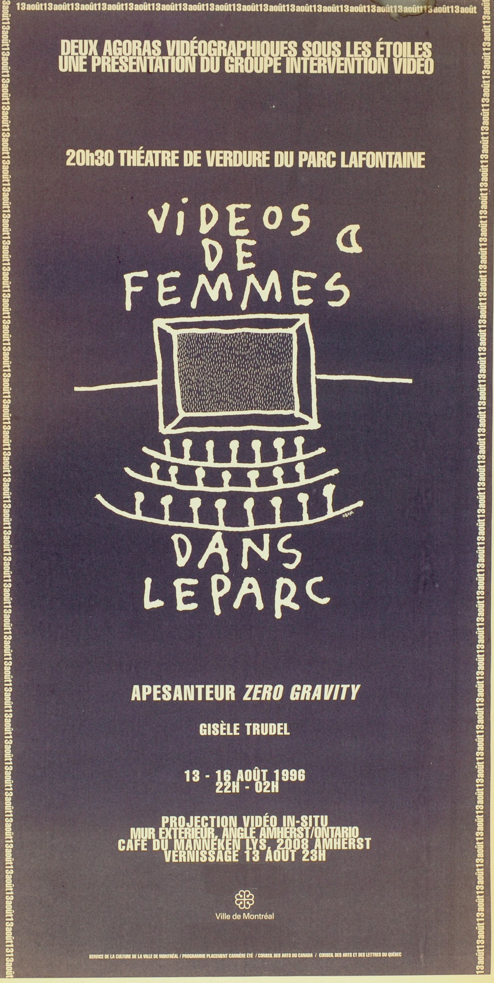 Affiche de l'événement Vidéos de femmes dans le parc organisé par le Groupe intervention vidéo du 13 au 16 août 1996. Ce festival diffuse des réalisations de femmes dans le Parc Lafontaine (Montréal) depuis 1992.